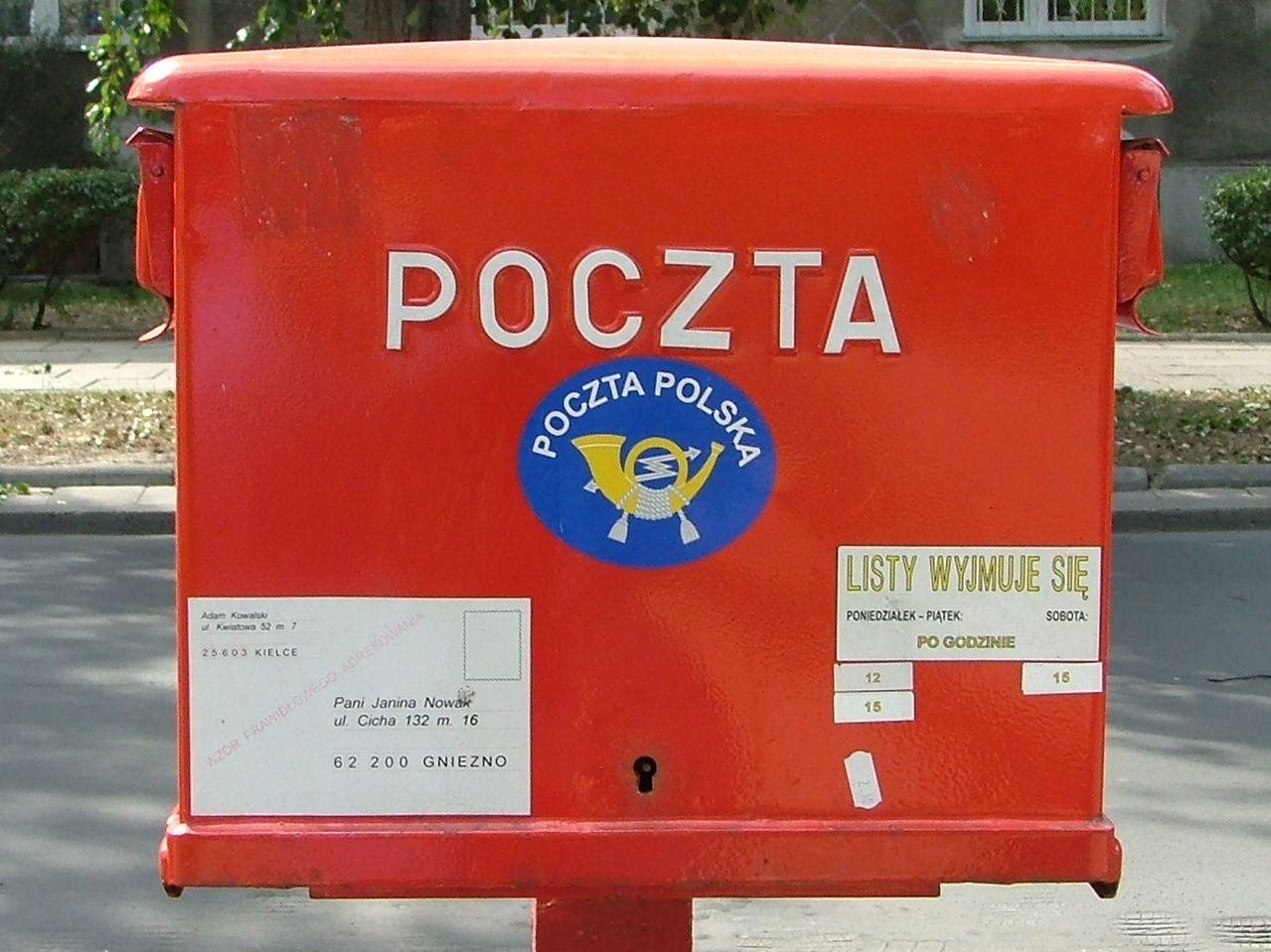 pl, Warsaw, Poland, Praga Południe, Grochów, ulica Międzyborska